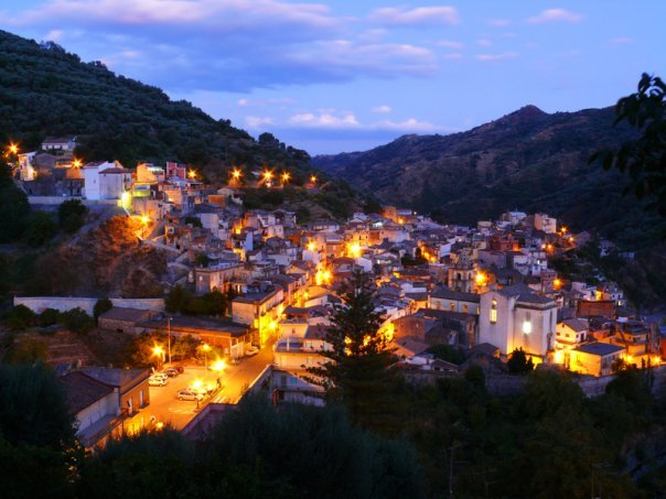 Mandanici di notte